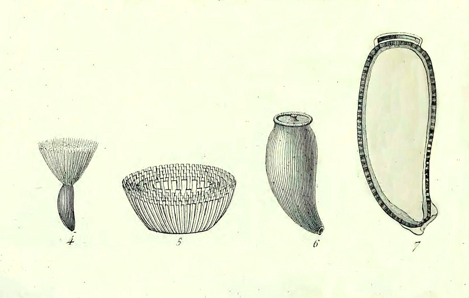 Rhaponticum canariense (como Serratula canariensis) en Webb P.B. & Berthelot S., Histoire Naturelle des Îles Canaries, 1846. Leyenda: 4: Cipsela con su vilano; 5: Base del vilano suelto; 6: Cipsela sin su vilano; 7: Cipsela sin su vilano cortada longitudinalmente.